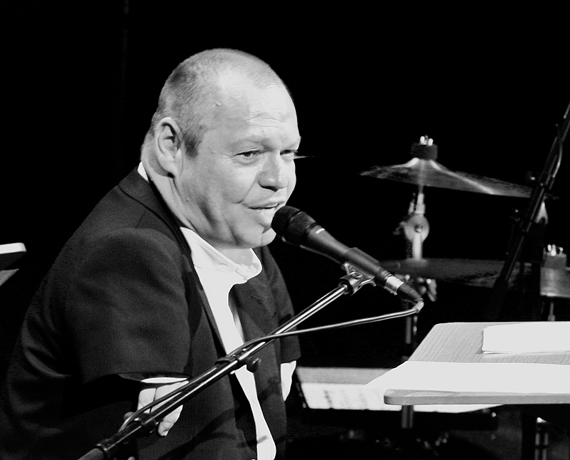 Thomas Quasthoff bei einem Auftritt in Köln